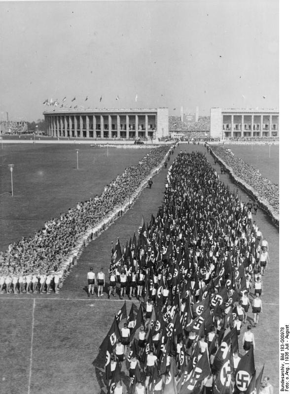 Berlin, Olympiade, Jugendvorführung ADN-ZB-Archiv XI. Olympische Sommerspiele 1936 Fahneneinmarsch bei den Jugendvorführungen auf dem Maifeld [Aufnahme: Scherl]